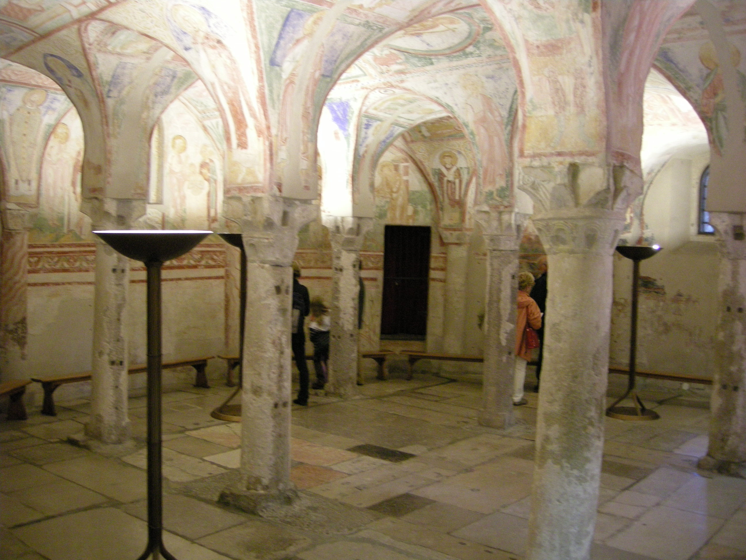 Basilica di aquilieia, cripta